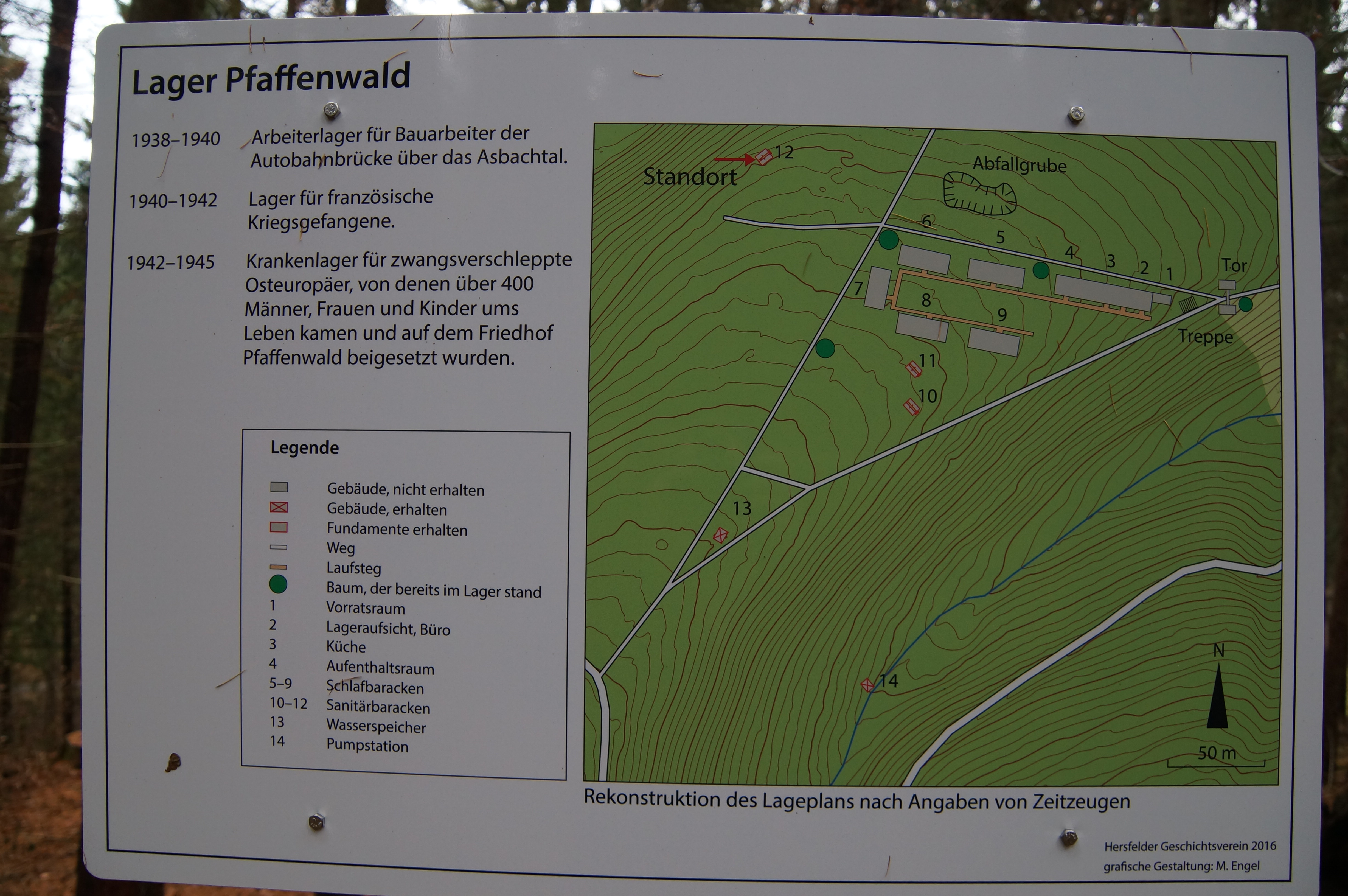 Lagerplan des Zwangsarbeitslagers Pfaffenwald, Darstellung des Hersfelder Geschichtsvereins